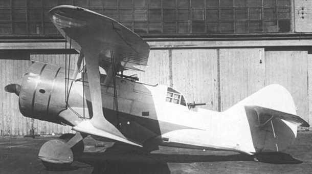 Kochyerigin DI-6i